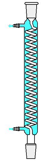 Graham condenser